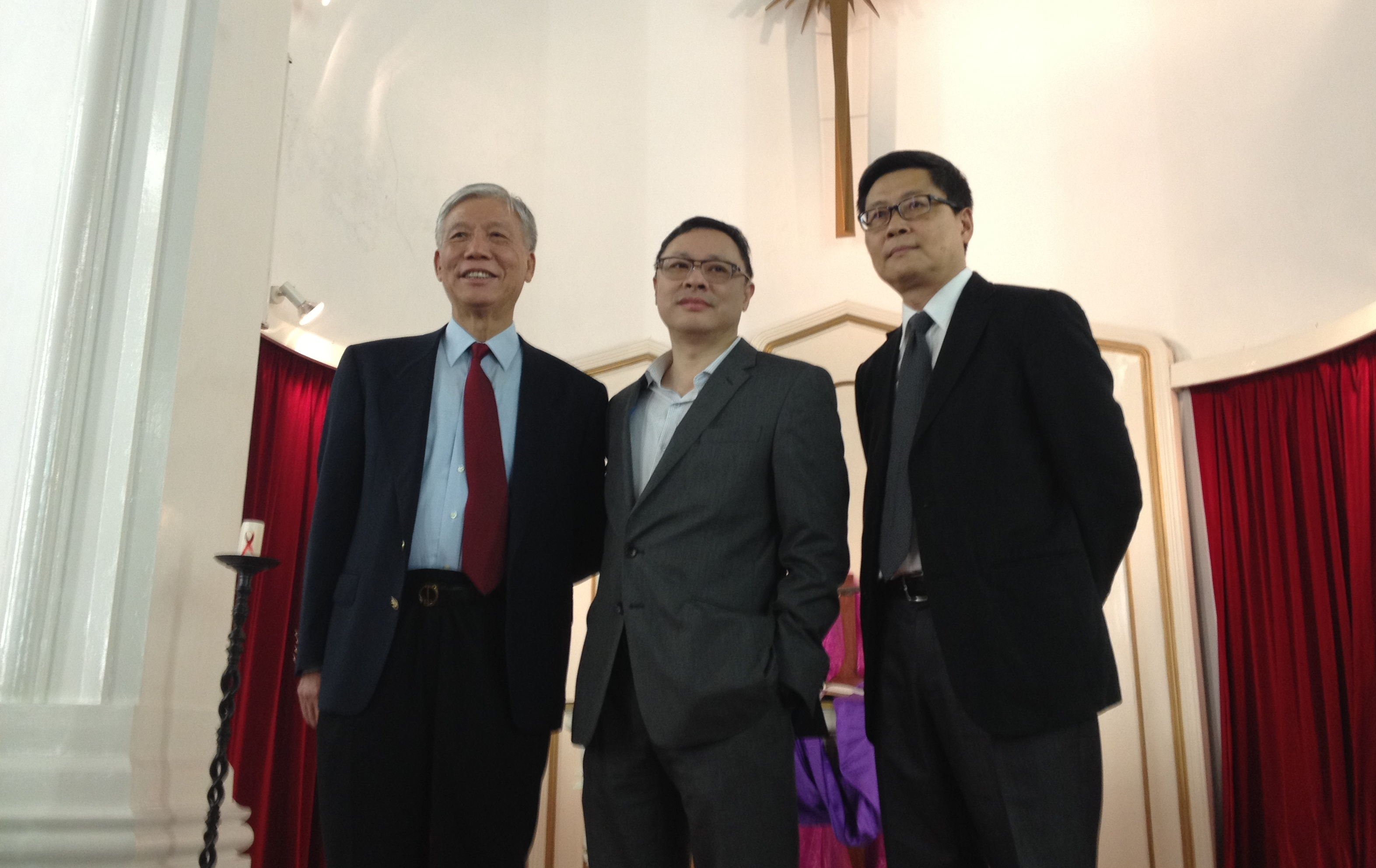 中文（香港）: 三位香港佔領中環爭取普選運動倡議者，朱耀明牧師(左起)、香港大學學者戴耀廷、香港中文大學學者陳健民.